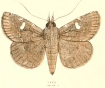 Bocana silenusalis Walker, 1859 (Asthala)